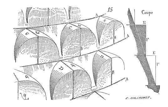 Clocher.Saintes ... Il existe encore, sur l'église de l'abbaye des Dames, à Saintes, un gros clocher, de la fin du XIe siècle, qui, rappelant encore les dispositions primitives du clocher de Saint-Front, est déjà franchement roman et abandonne les formes antiques qui caractérisent le clocher de Périgueux...